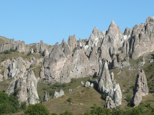 старый Горис, пещерный город